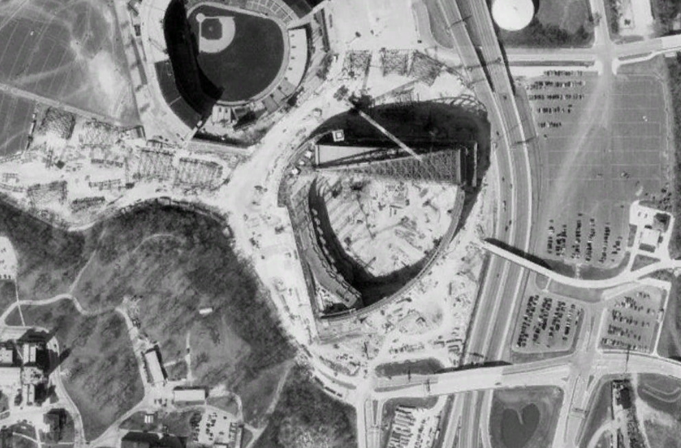 Image satellite du Milwaukee County Stadium et du Miller Park en construction Ã Milwaukee, Wisconsin Date: 31/3/2000